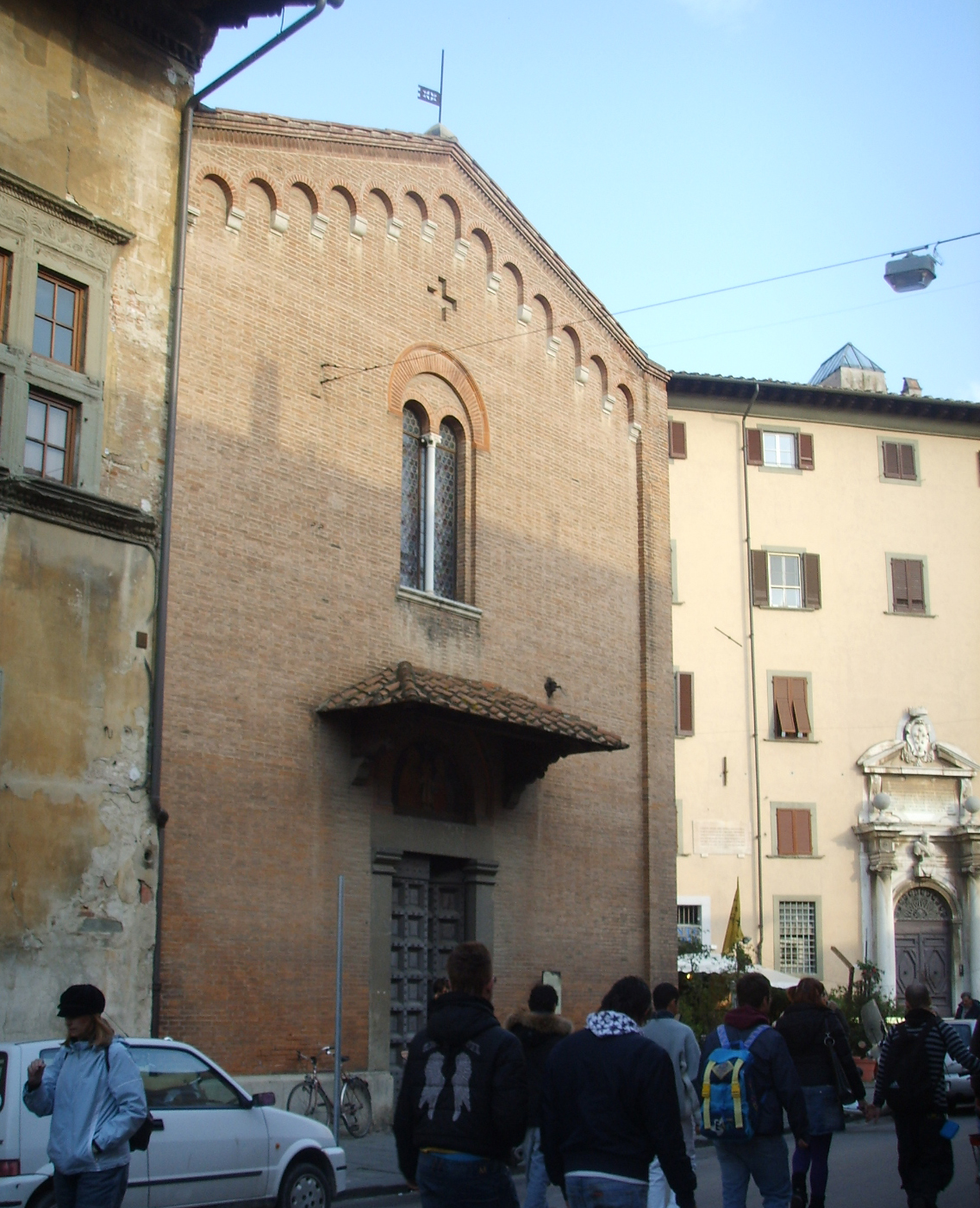 Chiesa_di_San_Giorgio_ai_Tedeschi